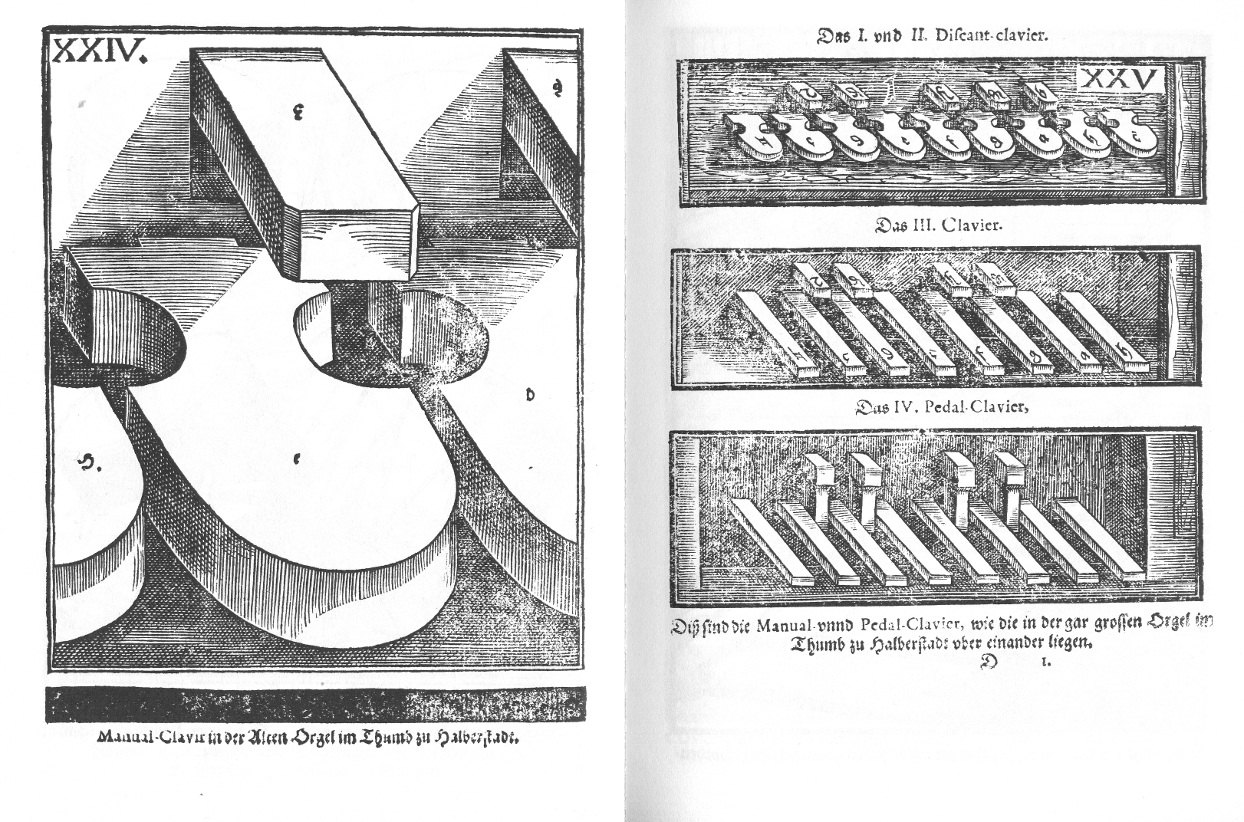 Syntagma Musicum Theatrum Instrumentorum seu Sciagraphia Wolfenbüttel 1620